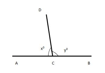 नेपाली: आसन्न कोण